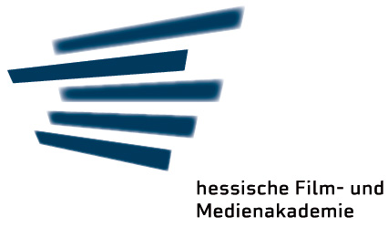 Das offizielle Logo der hFMA entworfen von Arndt Poser.